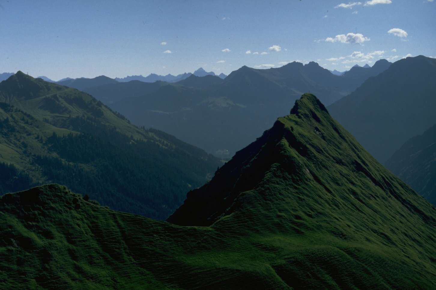 Uhnspitz von Westen